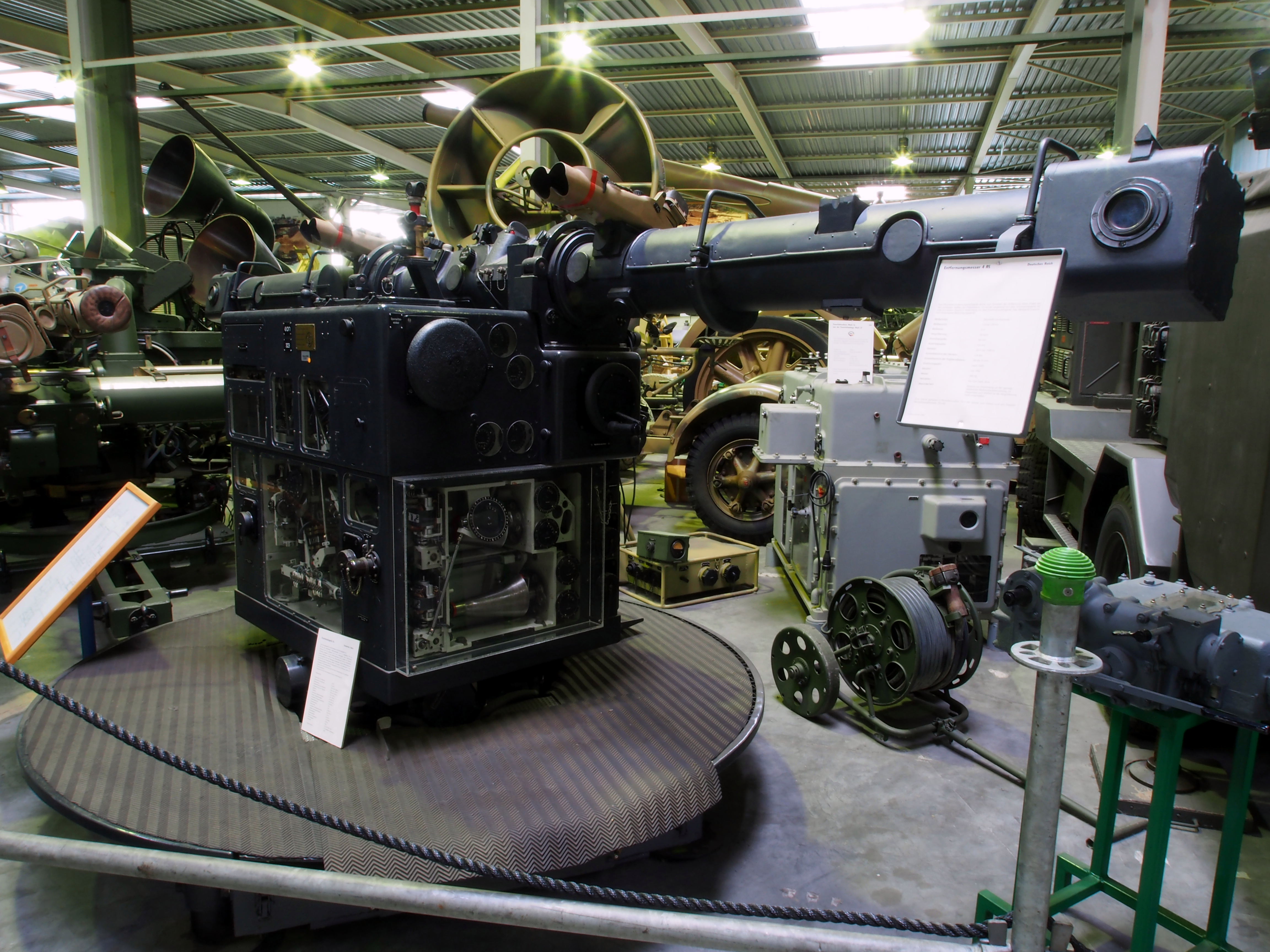 Entfernungsmesser 4 RL.